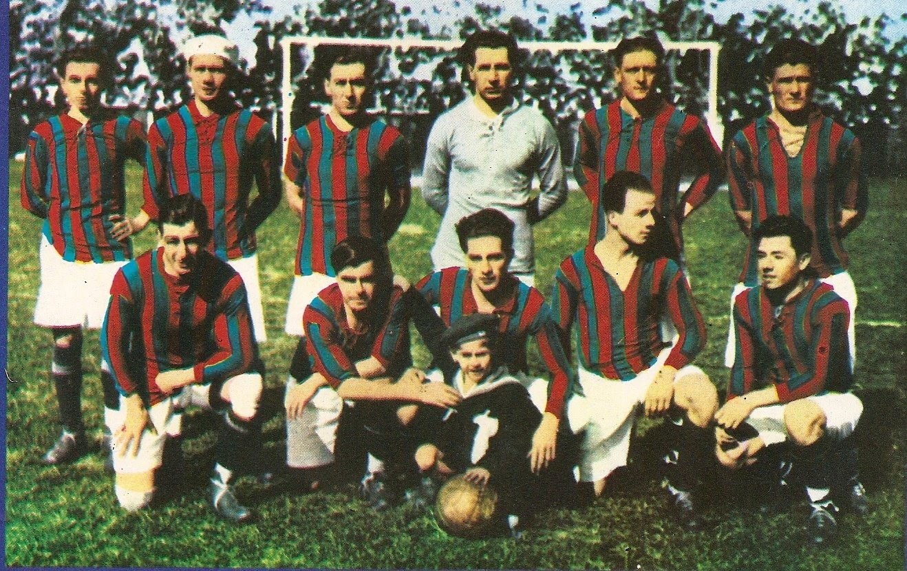 Equipo campeón amateur de la primera división argentina en 1923.